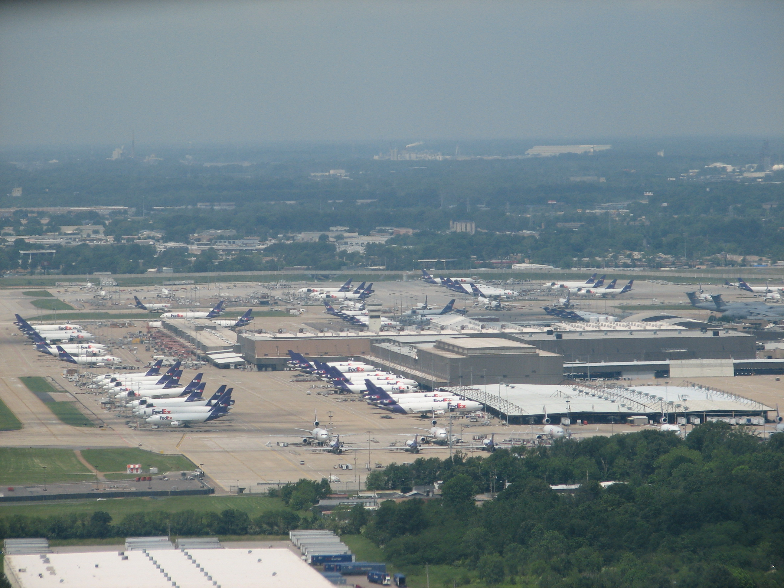 FedEx Super Hub ~` 27